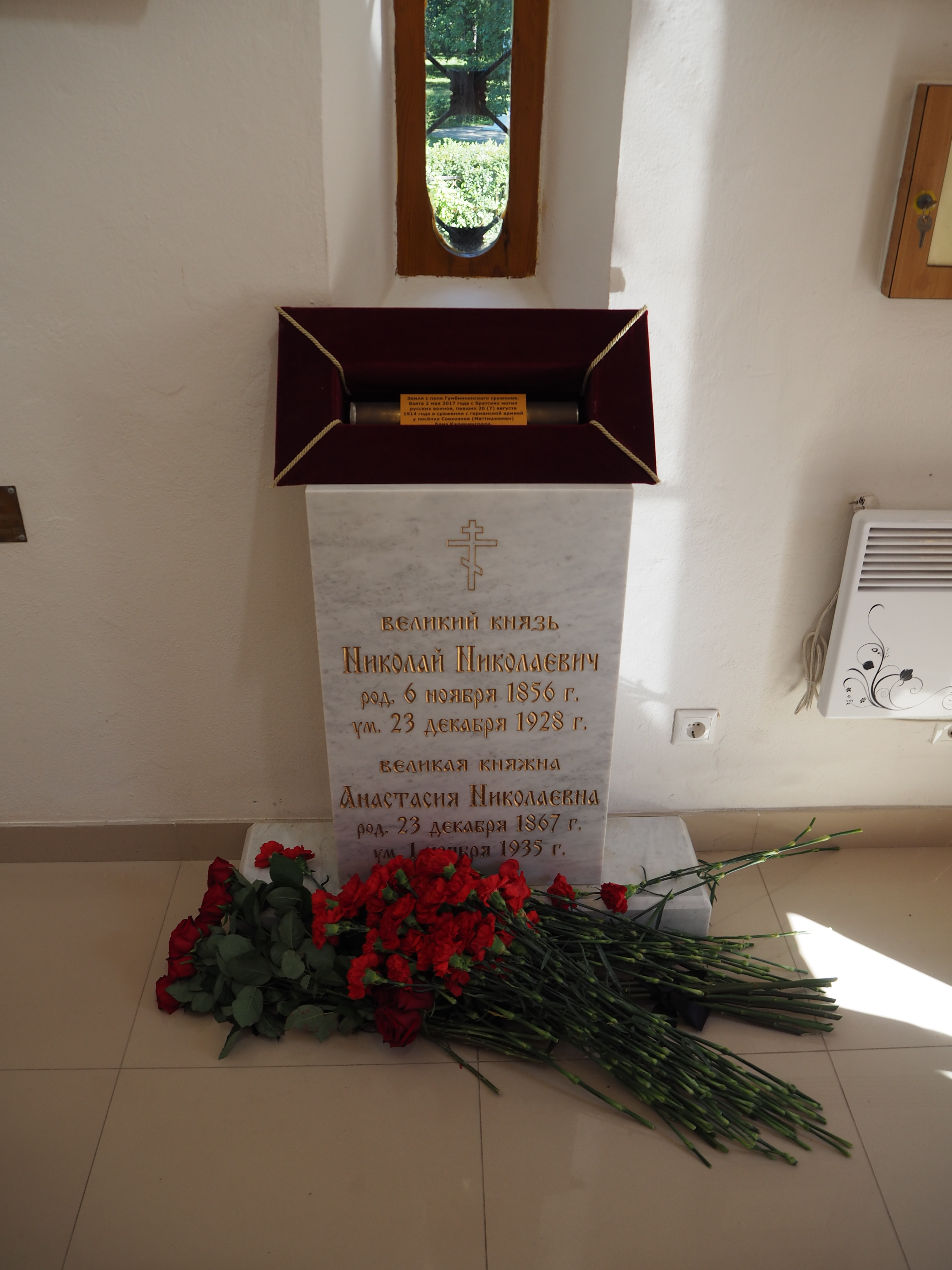 Часовня Спаса Преображения на Братском воинском кладбище.